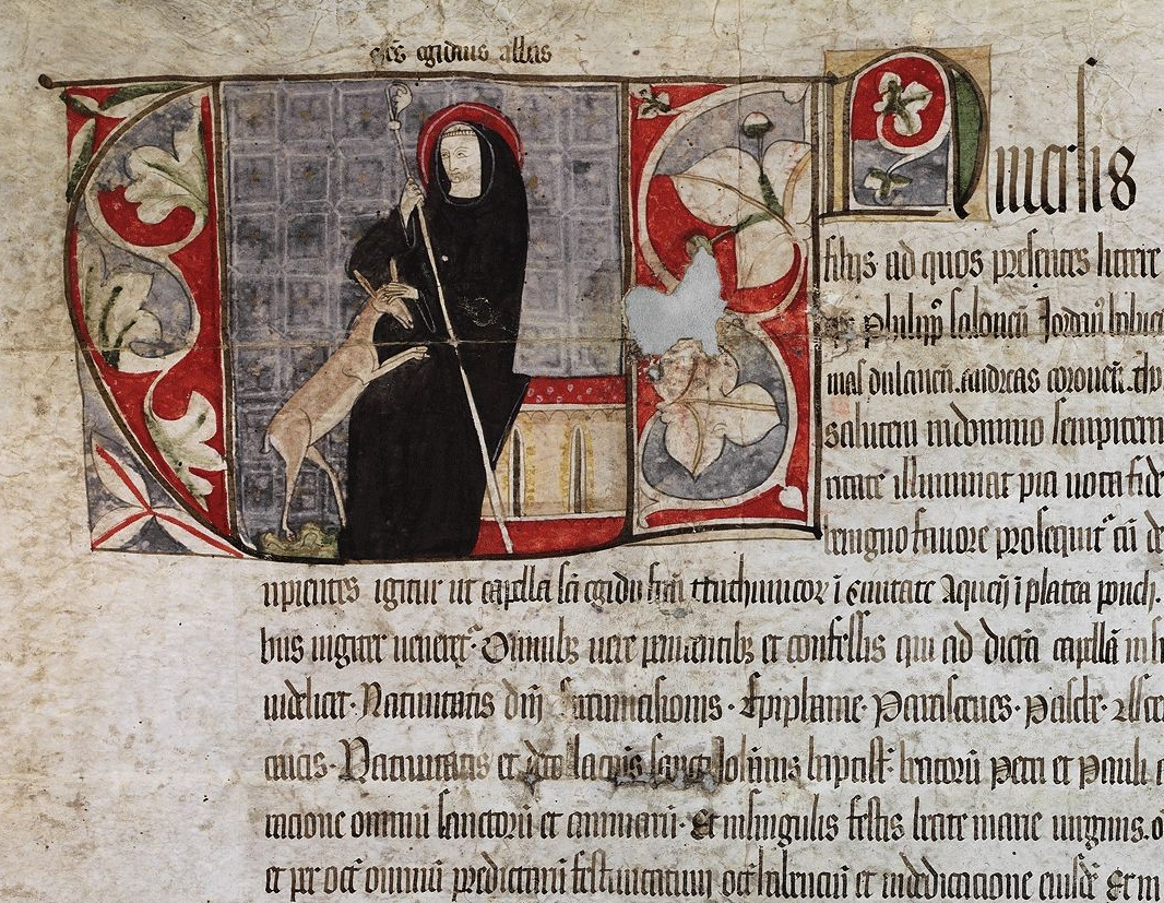 Aegidius abbas - Avignon, 1335 Januar 15, Ablass von 15 Erzbischöfen und Bischöfen für die St. Aegidiuskapelle der Deutschordensbrüder in Aachen. Hauptstaatsarchiv Stuttgart H 52